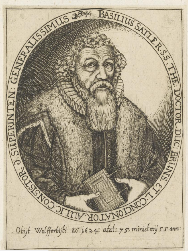 Radierung - Portrait des Basilius Sattler Nürnberg, Germanisches Nationalmuseum, Graphische Sammlung (Paul Wolfgang Merkel'sche Familienstiftung), Inventar-Nr. MP 20780